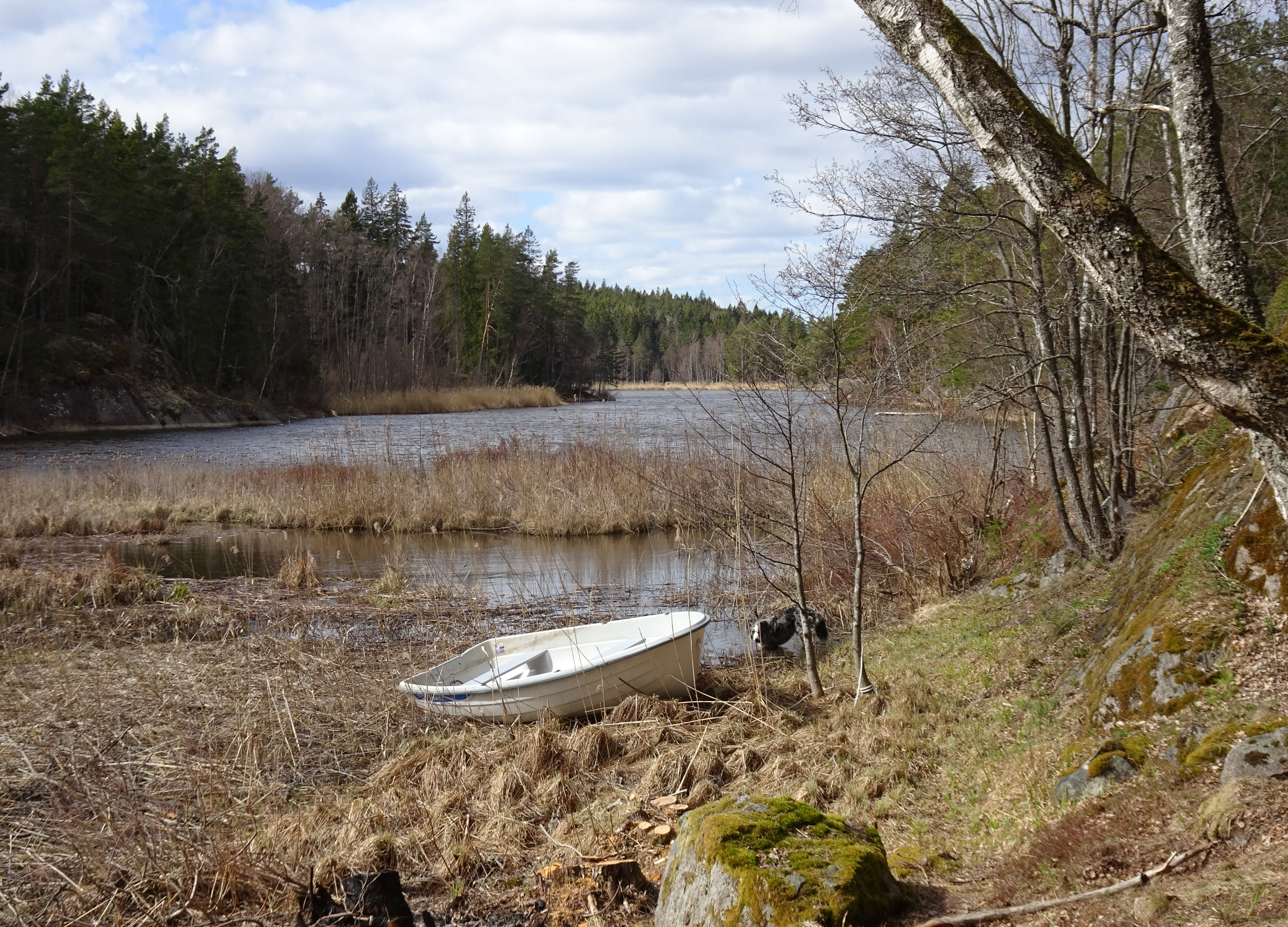 Kvarnsjön, Hölö socken nära Vrå gård